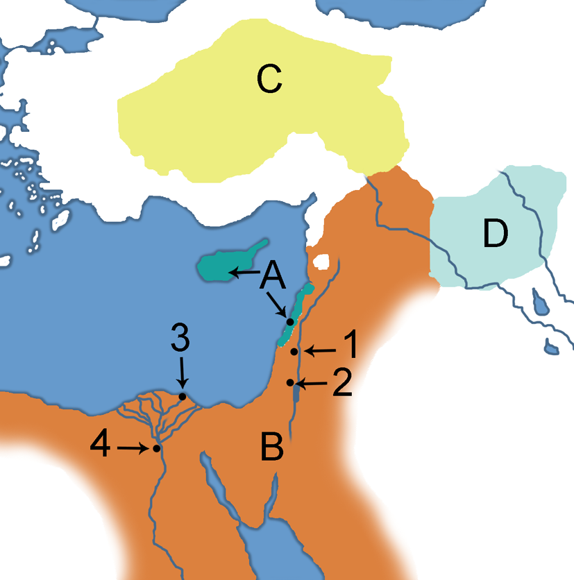 Dit is een overzichtskaart te verduidelijking van het artikel over de vijfde kruistocht.